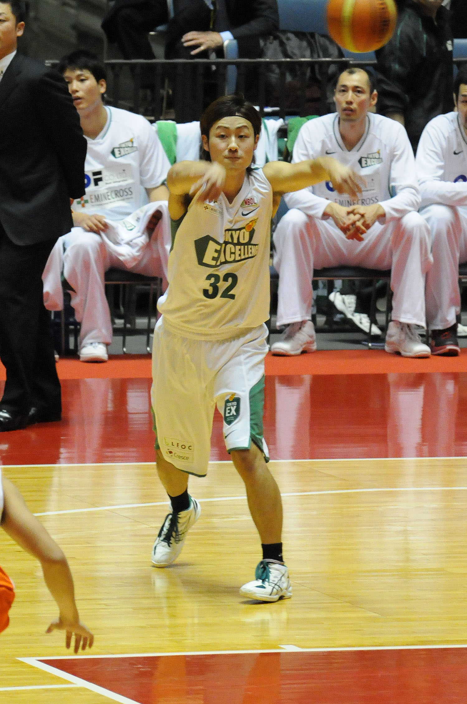 東京エクセレンス、狩野佑介選手。代々木第一体育館で。